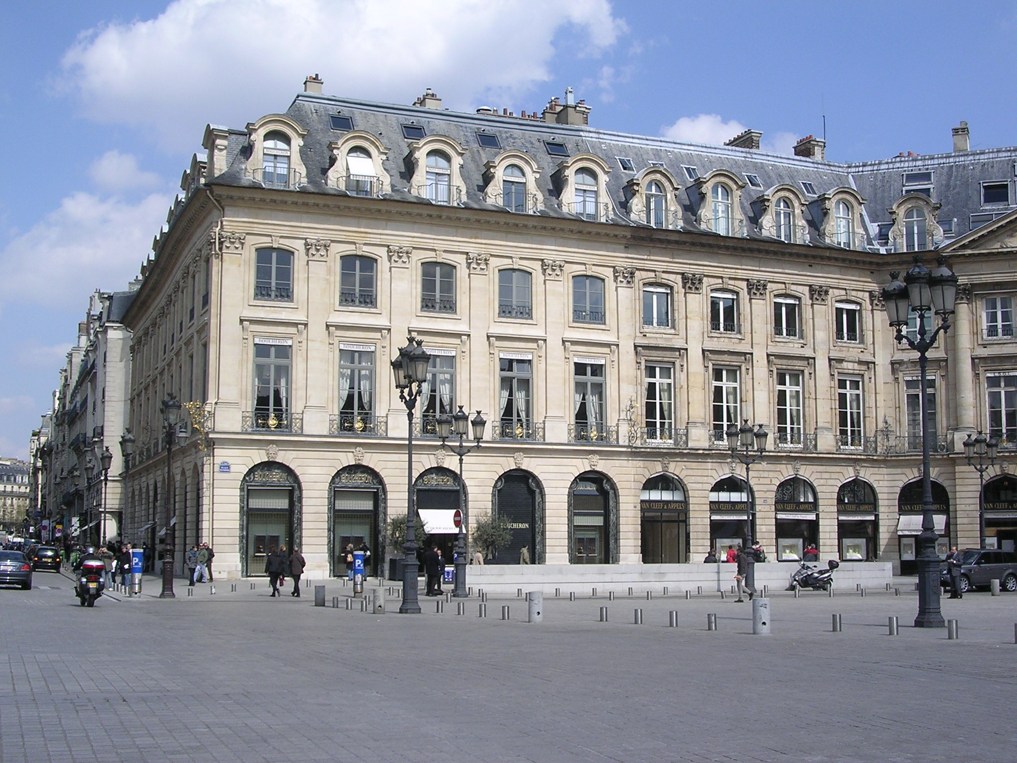 Boutique Boucheron, 26 Place Vendôme